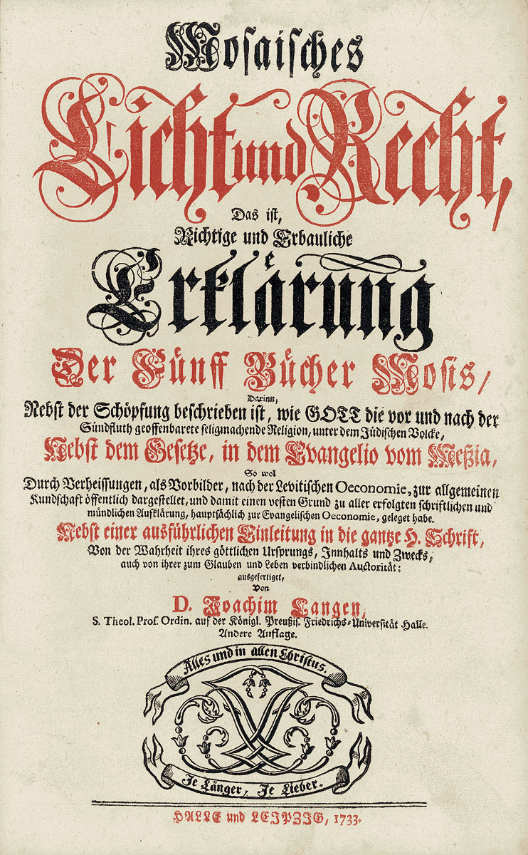 Joachim Lange: Mosaisches Licht und Recht, Das ist, Richtige und Erbauliche Erklärung Der Fünff Bücher Mosis, Darinn Nebst der Schöpfung beschrieben ist, wie Gott die vor und nach der Sündfluth geoffenbarete seligmachende Religion, unter dem Jüdischen Volcke, Nebst dem Gesetze, in dem Evangelio vom Meßia ... dargestellet, Andere Auflage, Halle und Leipzig 1733.